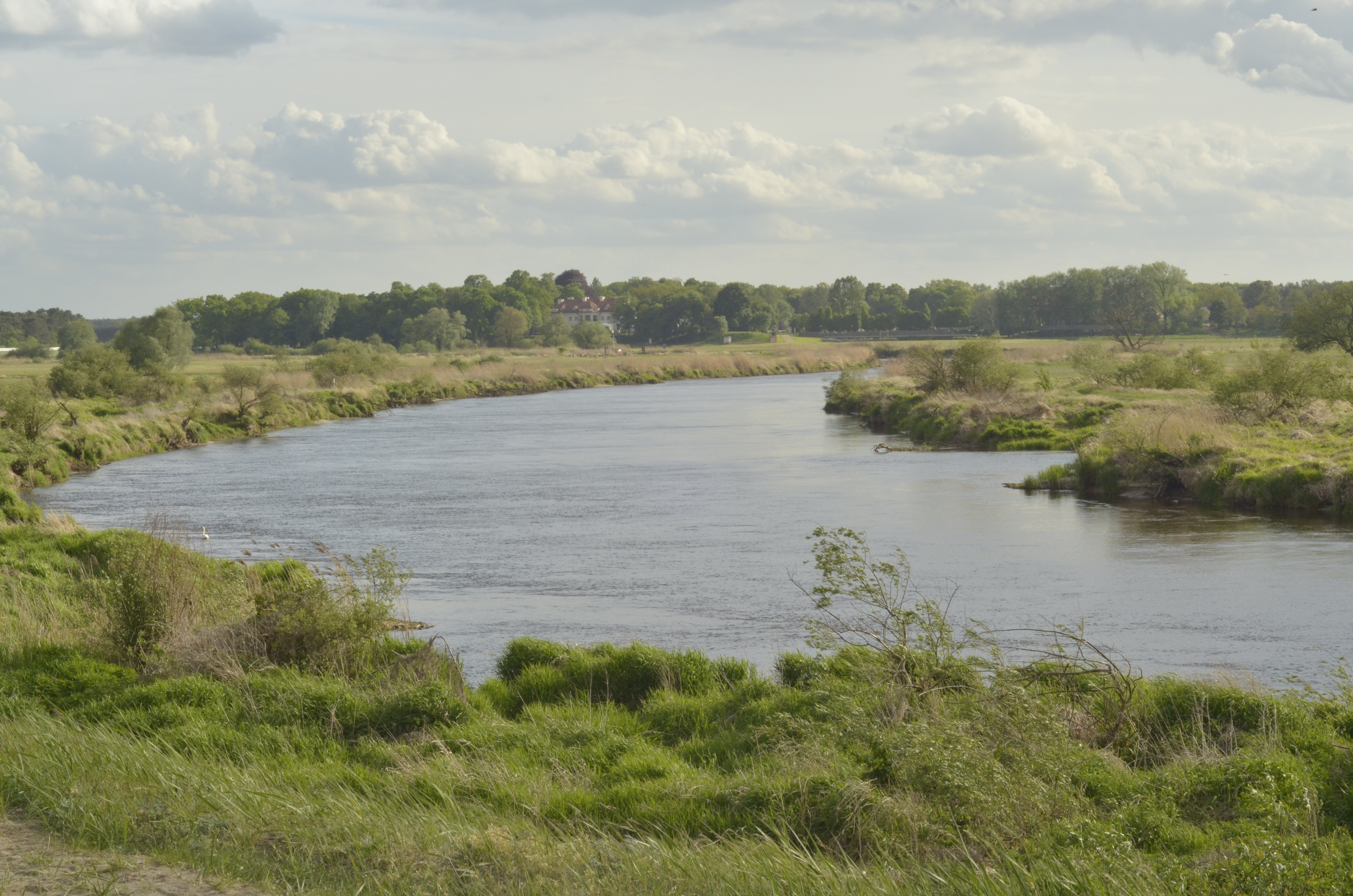 Rogaliński Park Krajobrazowy. Obszar specjalnej ochrony ptaków Ostoja Rogalińska. This is a photography of Natura 2000 protected area with ID PLB300017